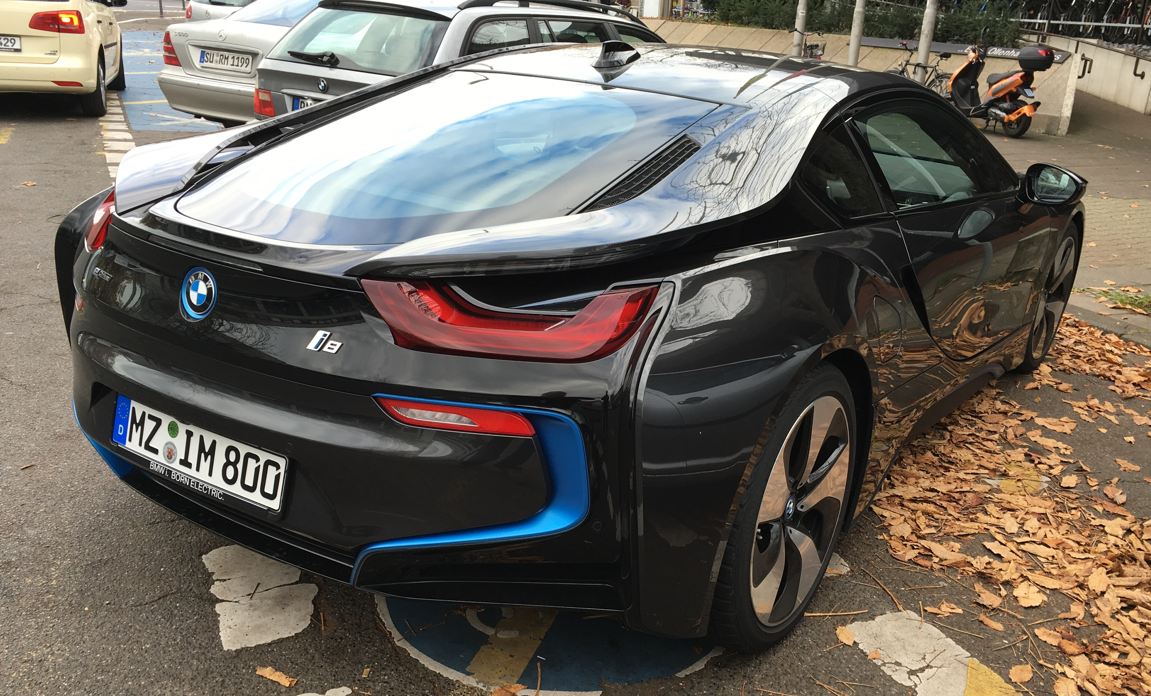 Bonn (Nordrhein-Westfalen) – BMW i8 hinten rechts